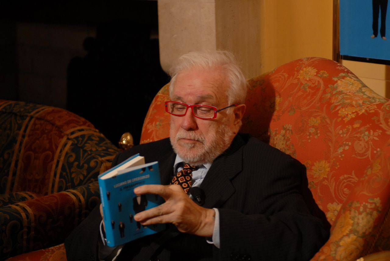 Luciano De Crescenzo, filosofo